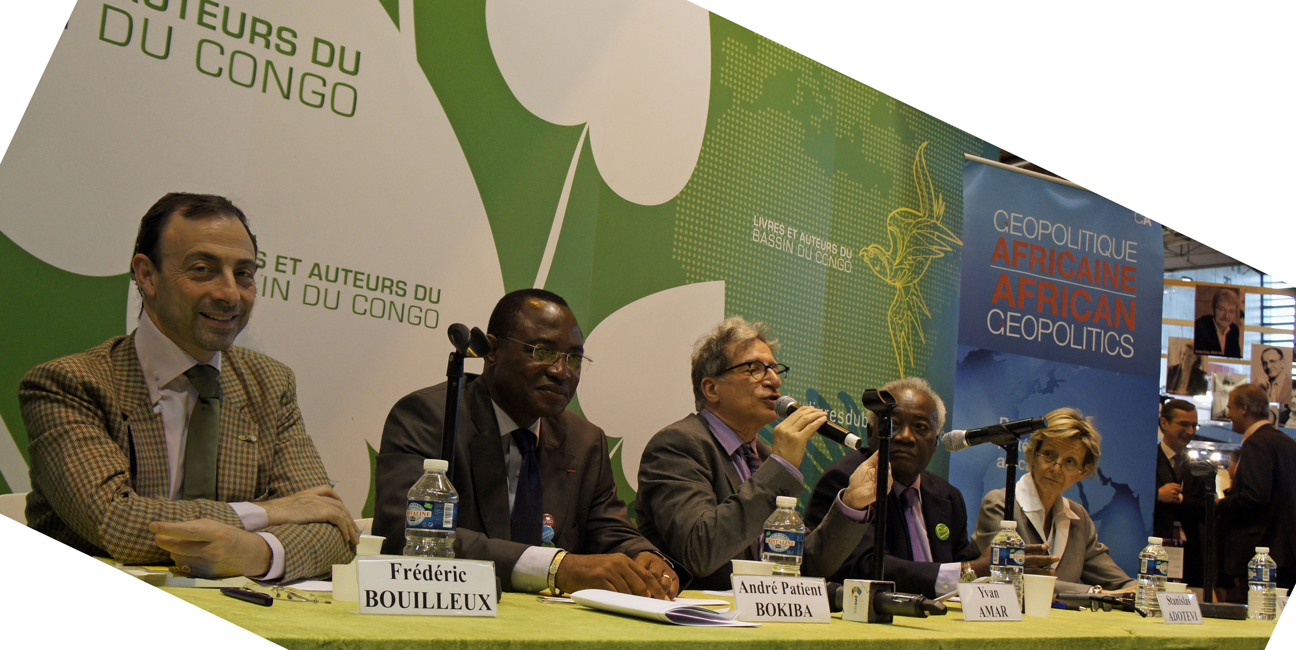 Table ouverte aux Livres et auteurs du bassin du Congo, de gauche à doite : Bouilleux Bokiba Amar Adotevi Cordelle, salon du livre 2012.